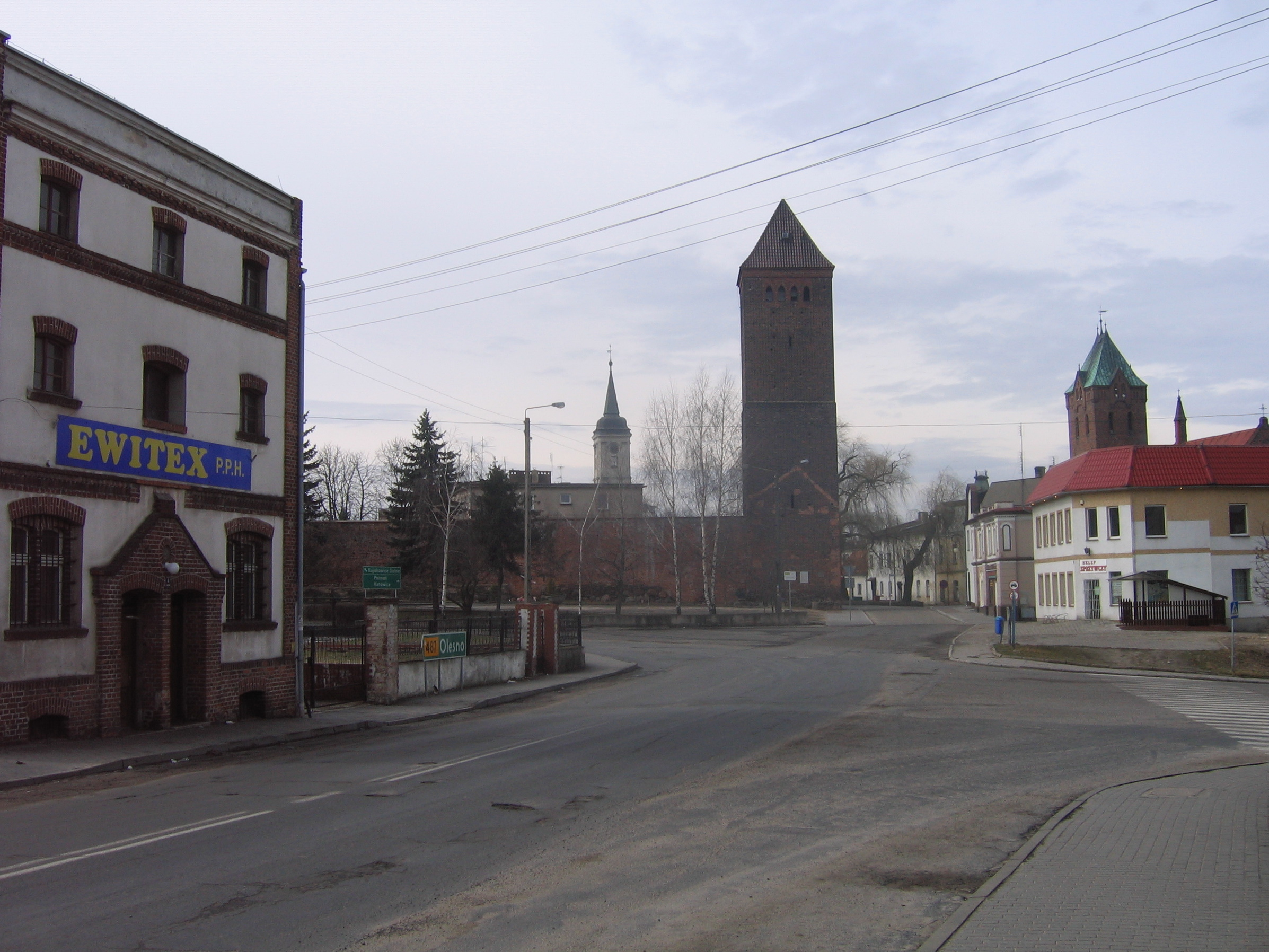 Byczyna, zespół urbanistyczny